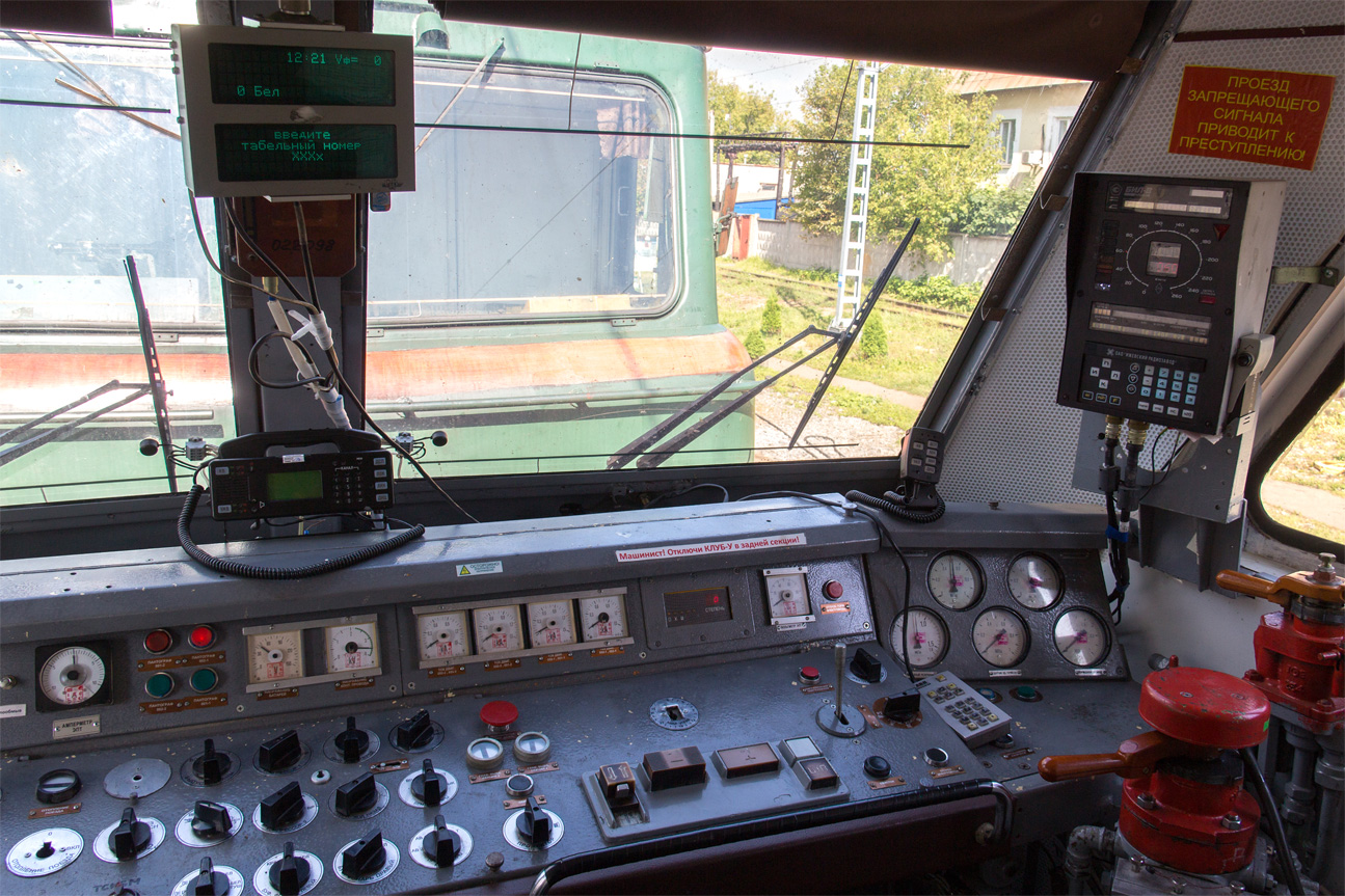 С завода поступил в депо Ленинград-Пассажирский-Московский (Октябрьской ж. д.) КР-2 Запорожский ЭРЗ 10.01.1986 г.; КР-1 Запорожский ЭРЗ 19.04.1991 г.; КР Škoda Plzeň 2.10.1999 г.; СР Ярославский ЭРЗ 12.08.2009 г.; 20.03.2011 г. — срок службы продлен до 2024 г. КР Ярославский ЭРЗ 08.2016 г.